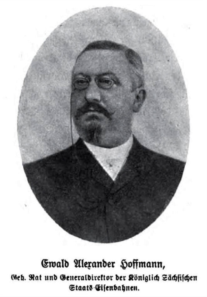 Ausschnitt des Bildnisses Nr. 253 aus der Festzeitschrift zum 70. Geburtstag und 25. Thronjubiläum von König Albert von Sachsen